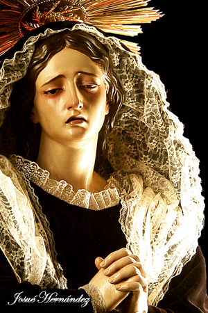 Nuestra Señora de los Dolores. (1816). Fernando Estévez de Salas (1788-1854). Parroquia de San Juan Bautista, La Orotava.